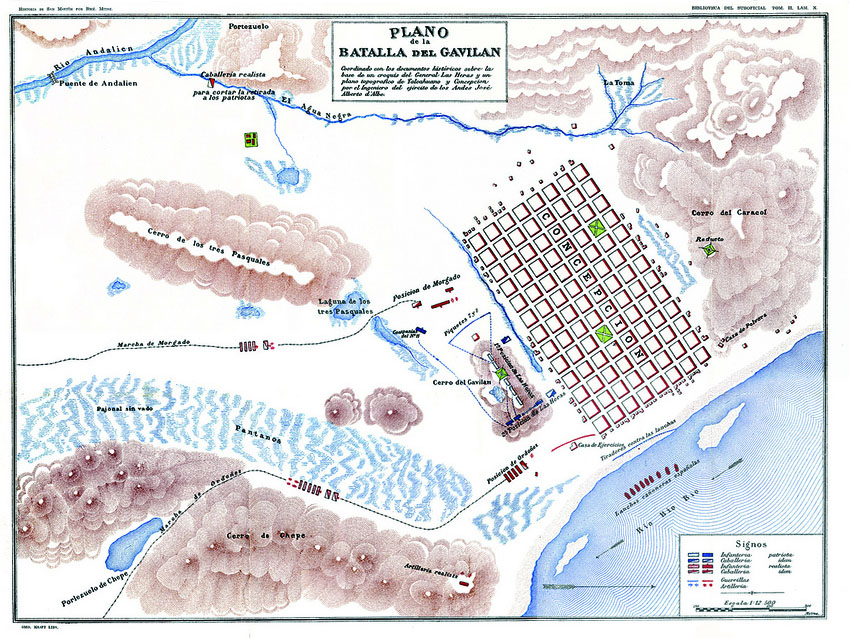 El Combate del Cerro Gavilán fue una batalla de la Patria Nueva chilena, llevada a cabo entre realistas españoles y el Ejército Unido - coalición del Ejército de los Andes y cuerpos milicianos chilenos -, en los suburbios de Concepción el 5 de mayo de 1817. Las fuerzas del Ejército Unido eran lideradas por el director supremo Bernardo O'Higgins y el brigadier Juan Gregorio Las Heras, en tanto que las fuerzas realistas eran comandadas por el General en jefe del ejercito español, José Ordóñez.